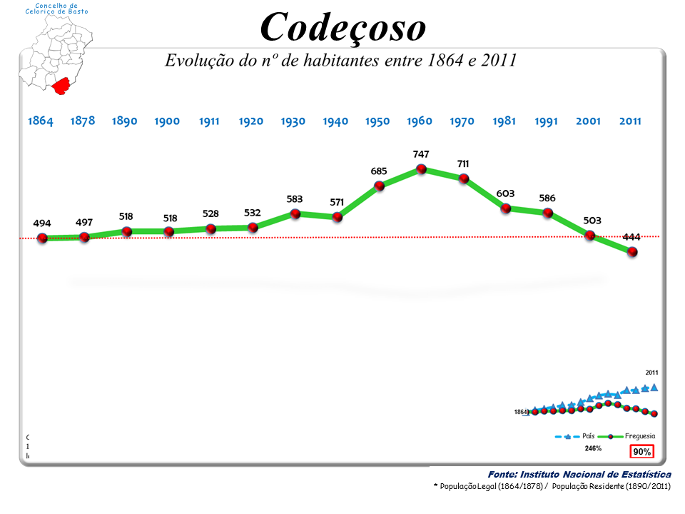 Censos 1864/2011